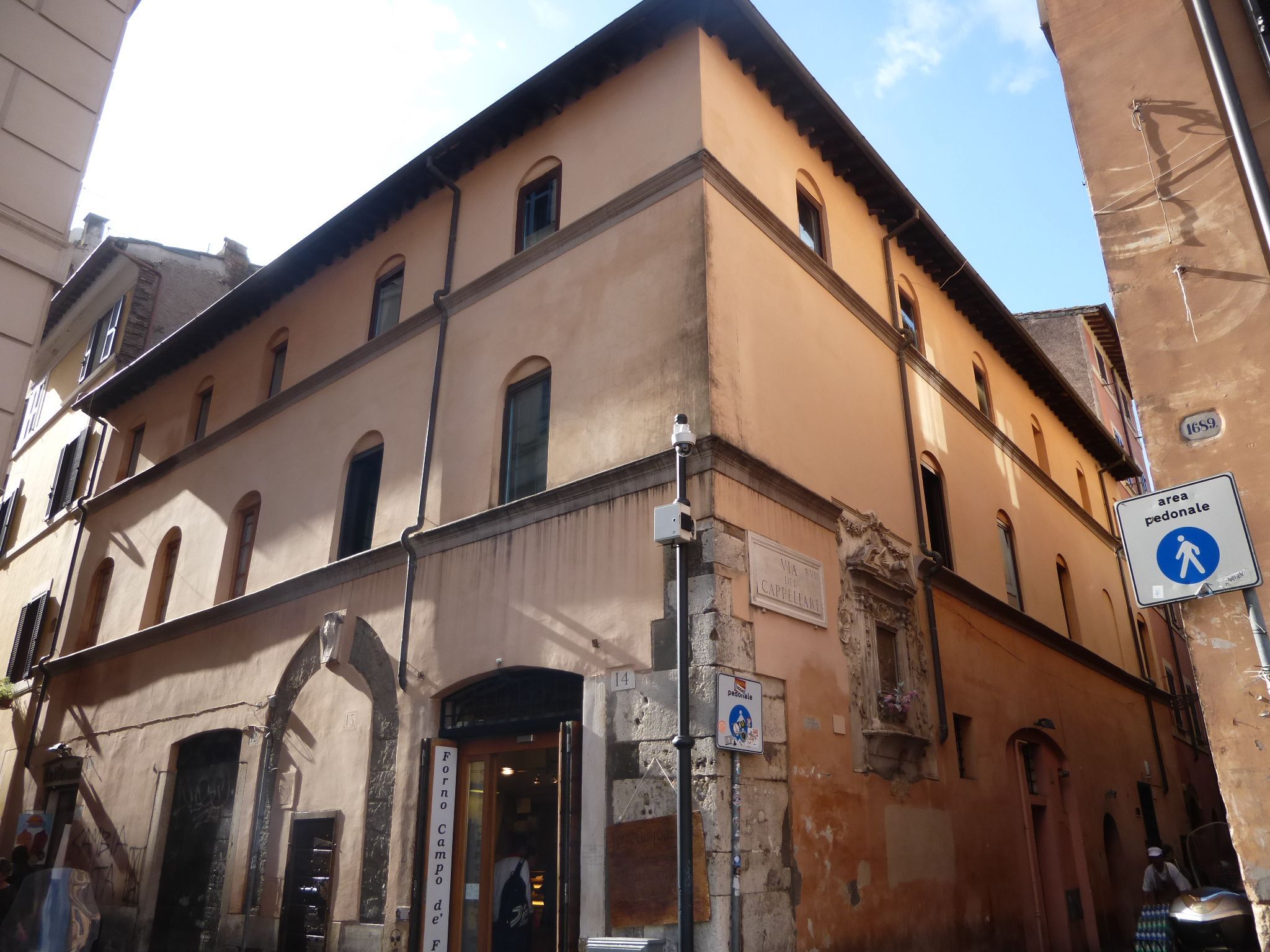 Roma, Campo de' Fiori angolo Cappellari, locanda del Gallo già di Vannozza Cattanei